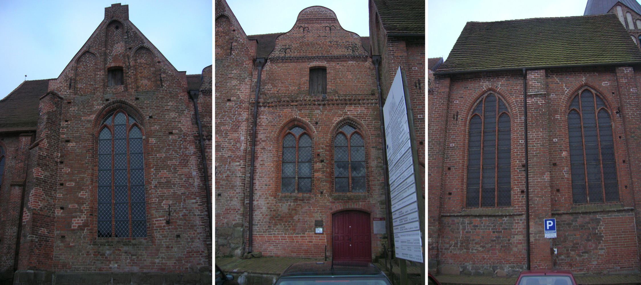 St.Annen-, Lützow- und Königskapelle der Stadtkirche Gadebusch